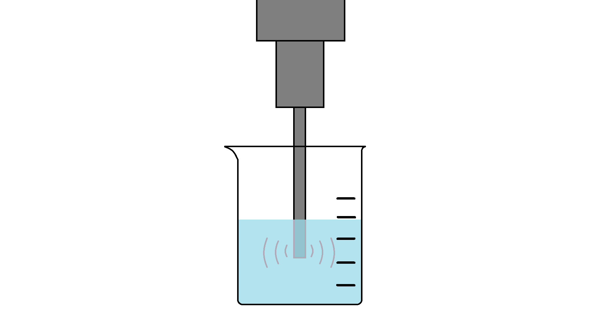 Sonicateur